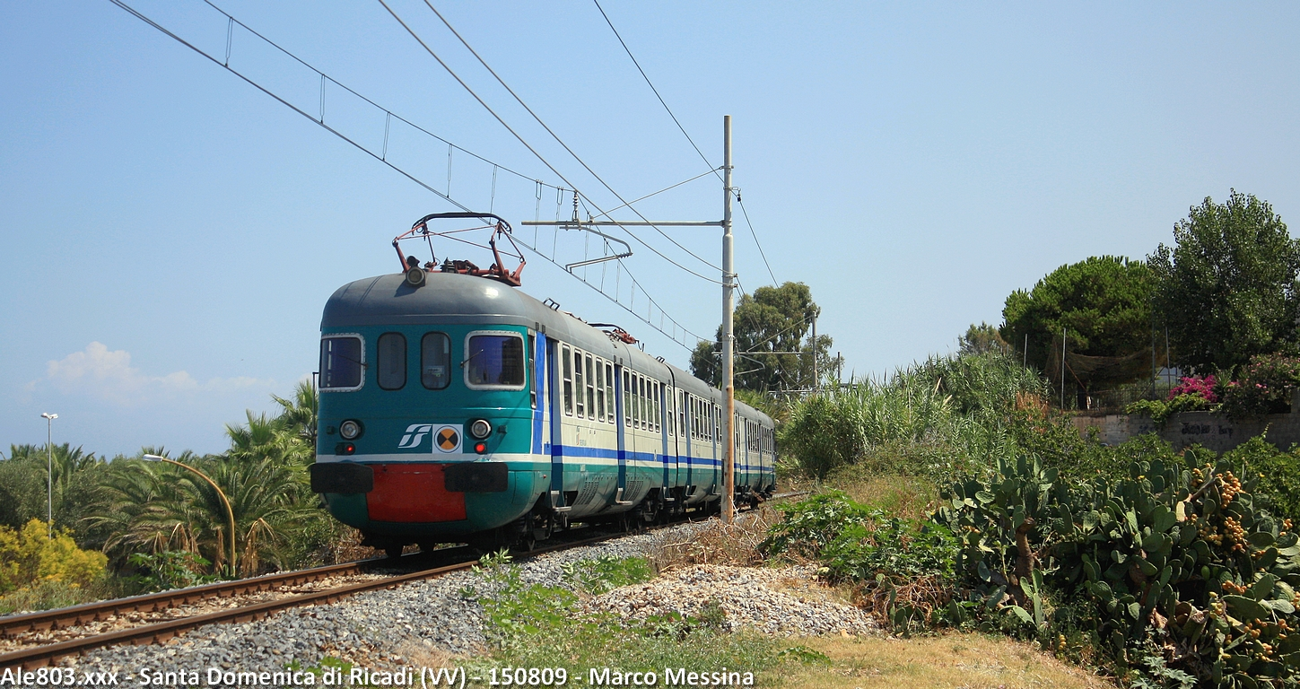 Un complesso di Ale 803 si dirige verso Tropea, espletando un Regionale Rosarno - Lamezia Terme